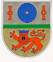 Wappen von Mühlpfad